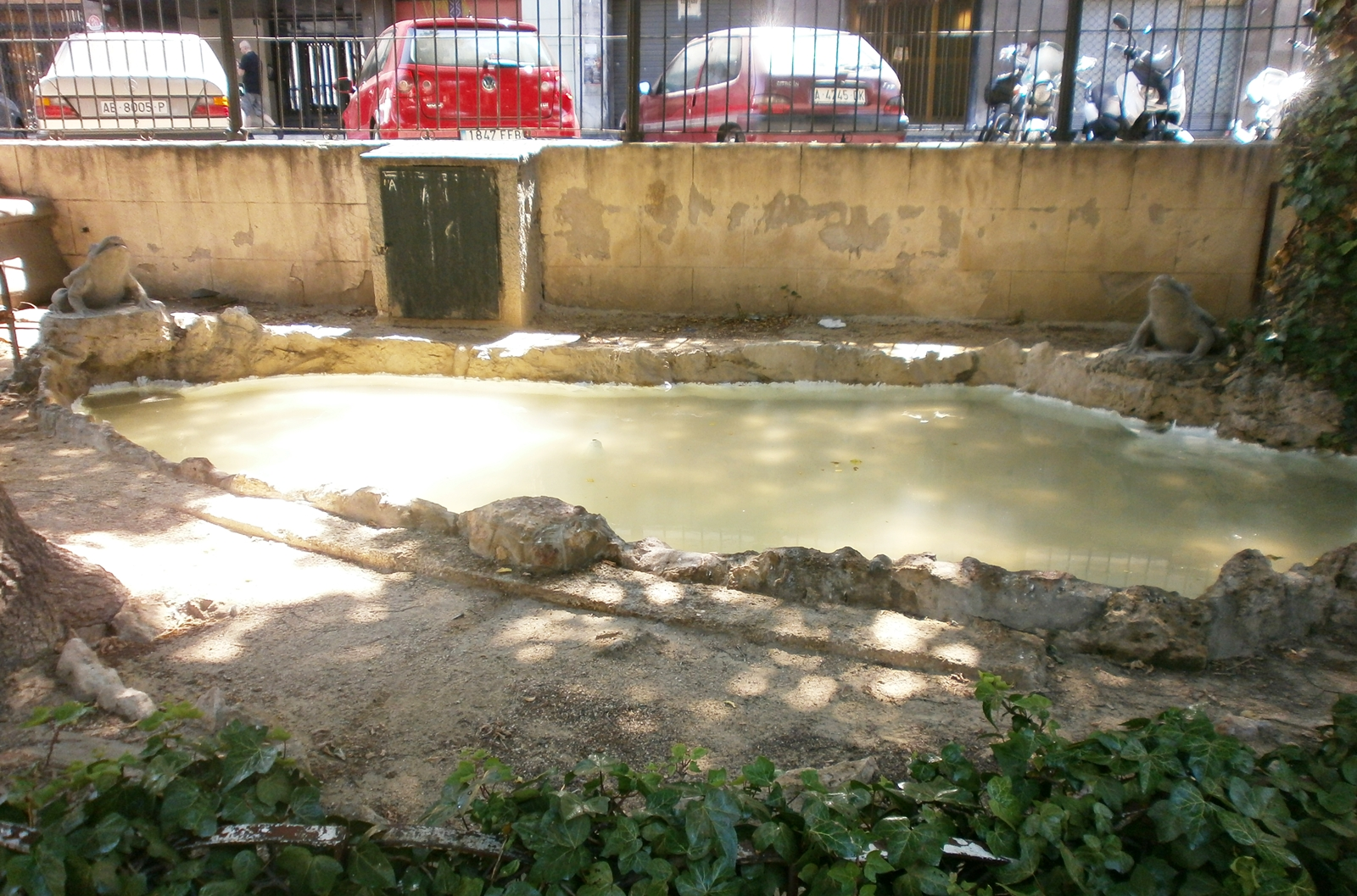 Estanque artificial y pareja de ranas del Panteón de Quijano, Alicante, España.